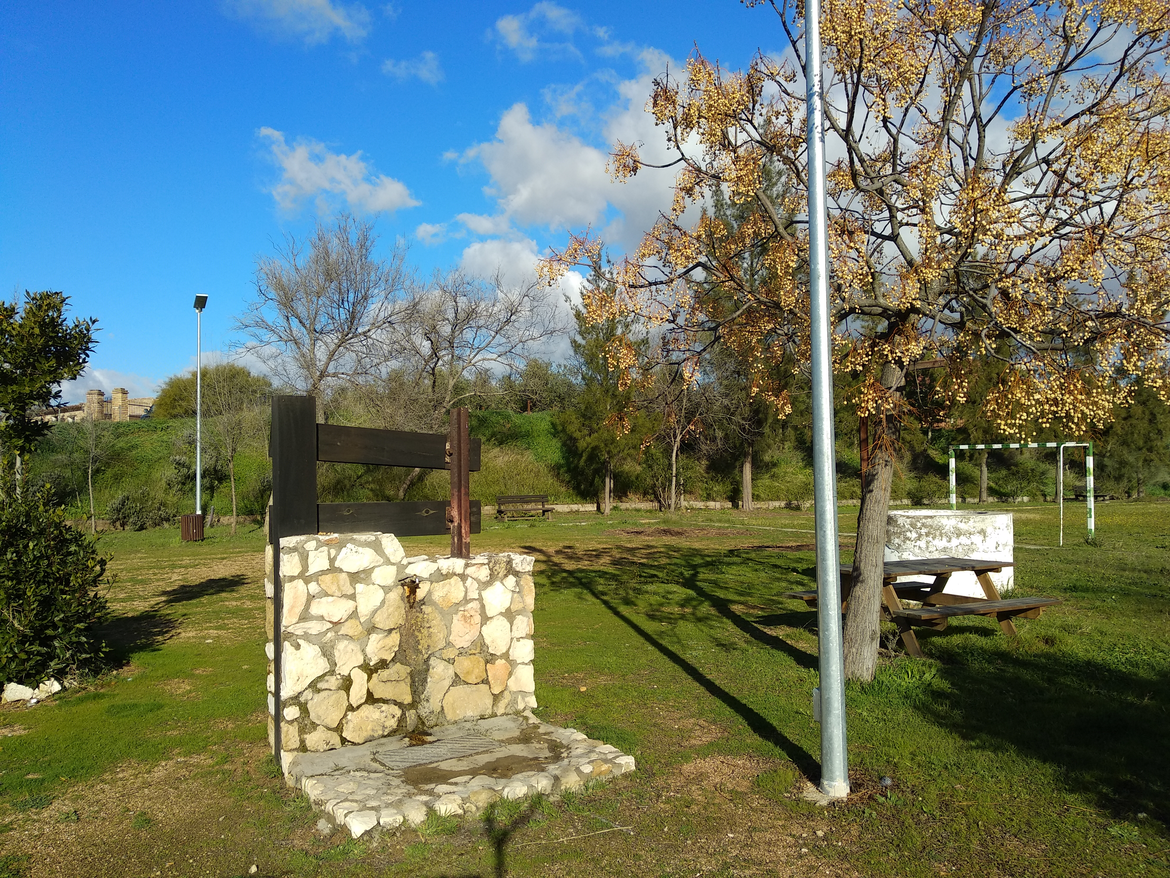 Emplazamiento de la antigua estación ferroviaria de Guadalcázar (Córdoba)